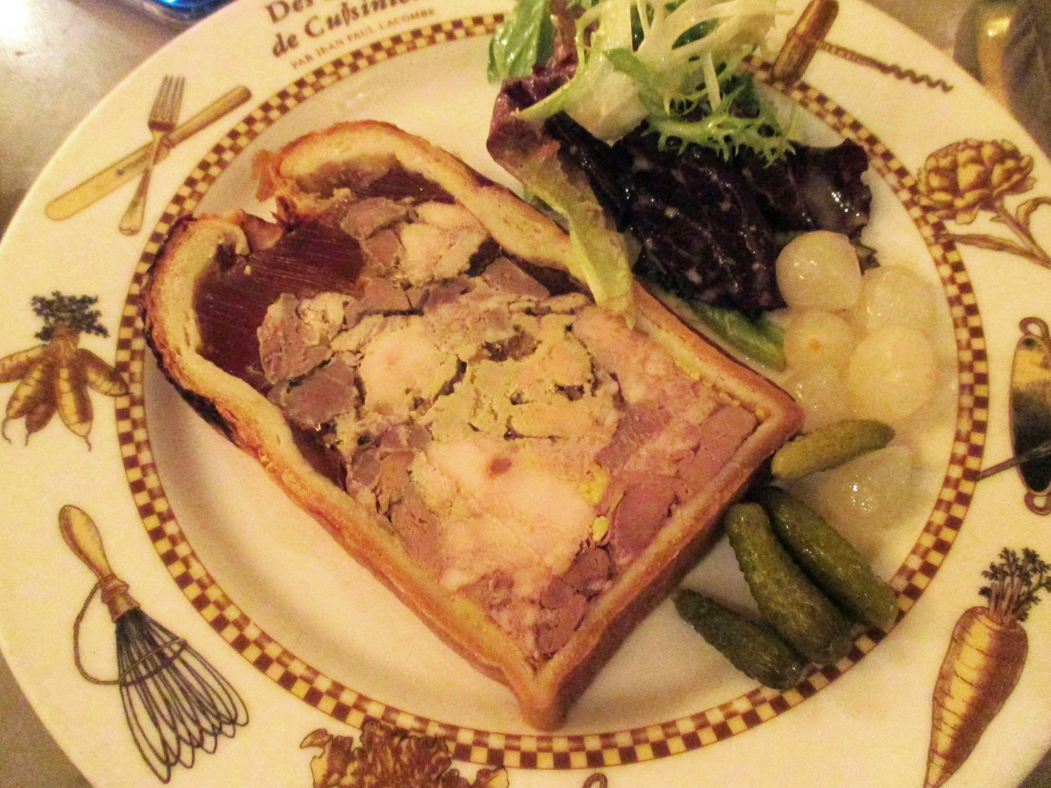 Pâté en croute